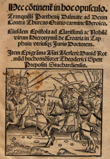 Ad Deum contra Thurcas oratio carmine heroico, 1515, Andronicus Tranquillus Parthenius (1490-1571)